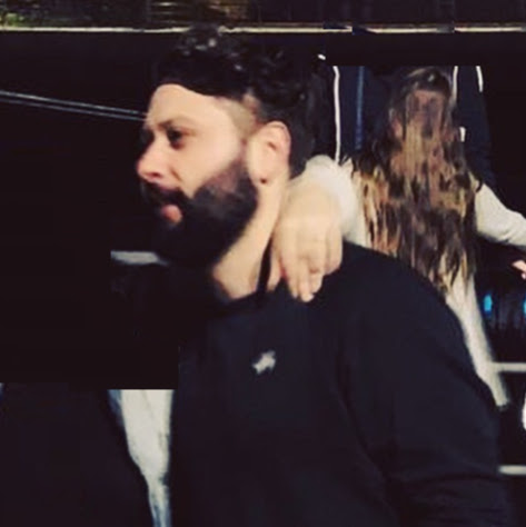 Hamburg 2019